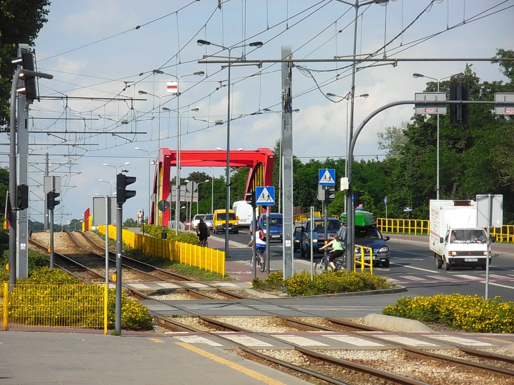 Wiadukt w ciągu ul. Gdańskiej w Bydgoszczy